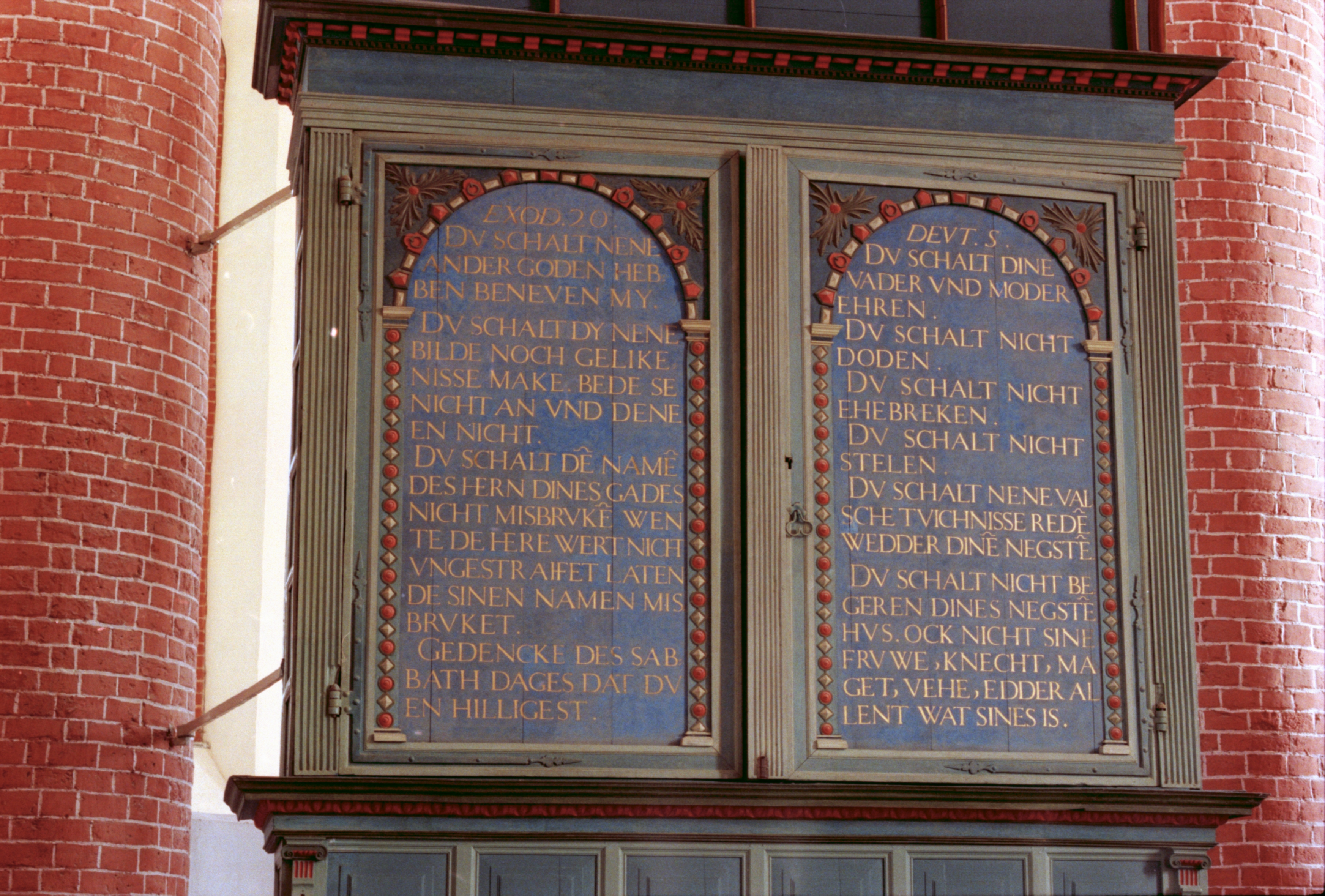 Hochaltar zugeklappt, Beschriftung: die Zehn Gebote